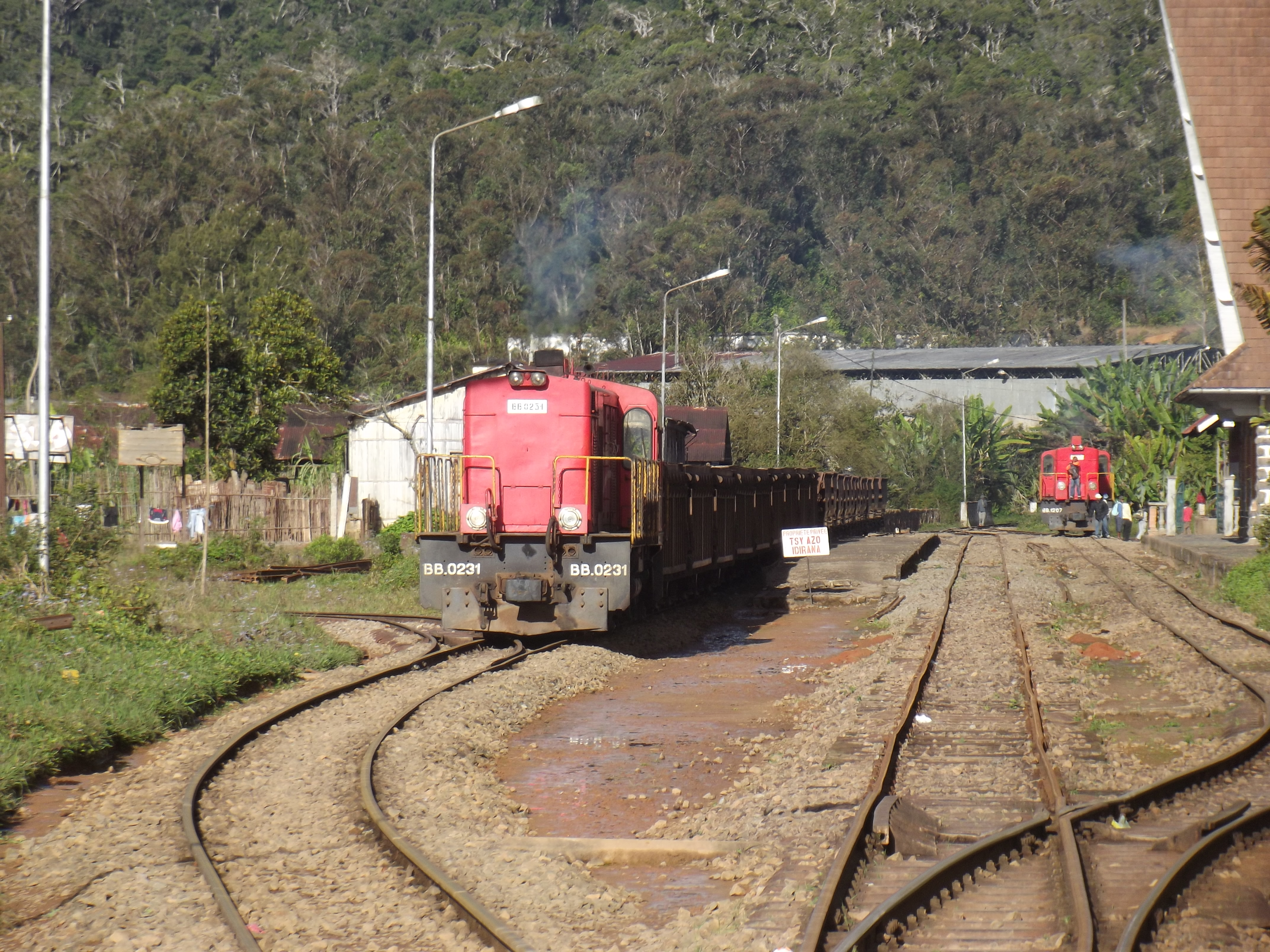 Spooractiviteit in Andasibe station